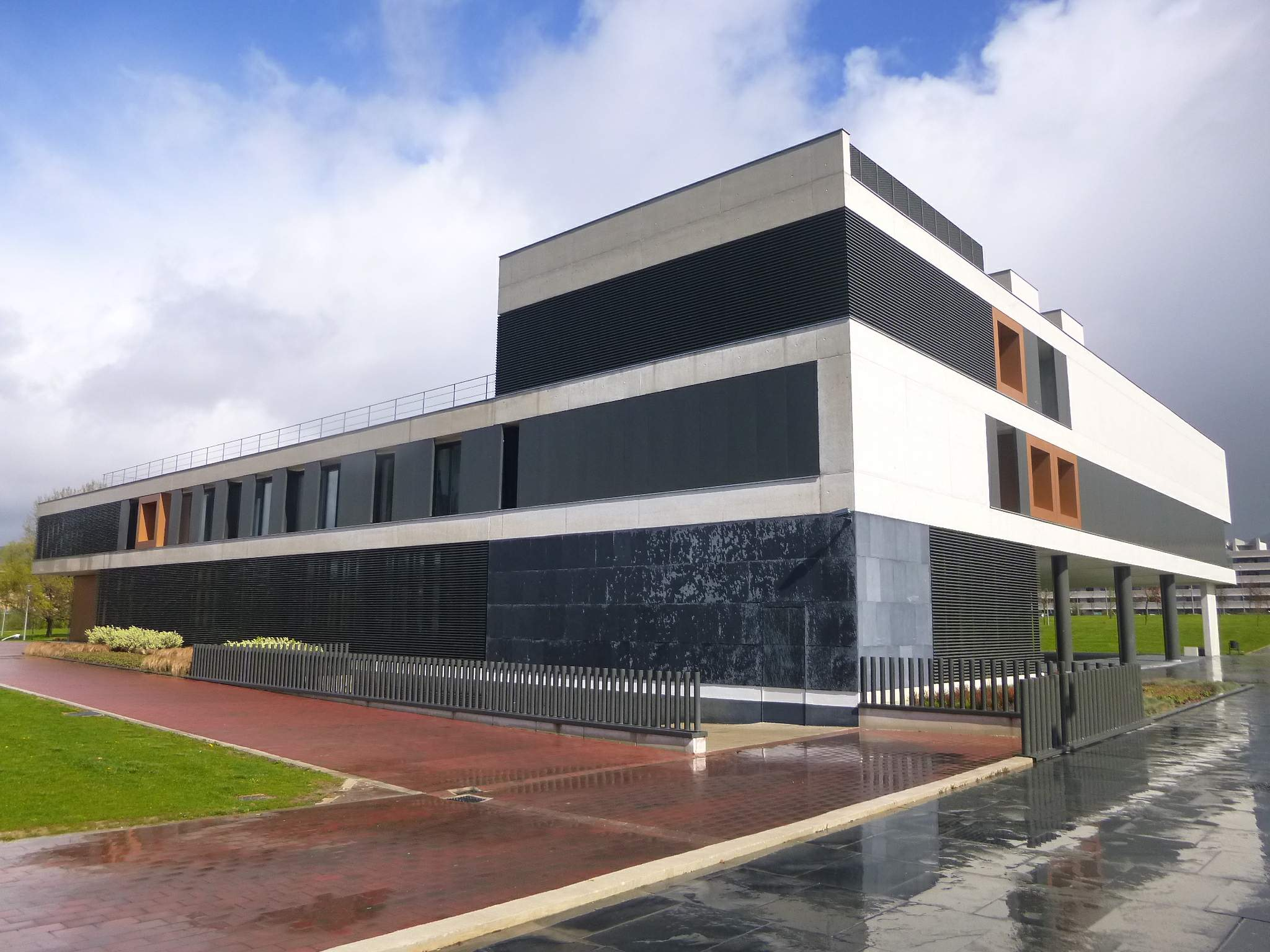 Ayuntamiento de Egüés, en Sarriguren (Navarra)